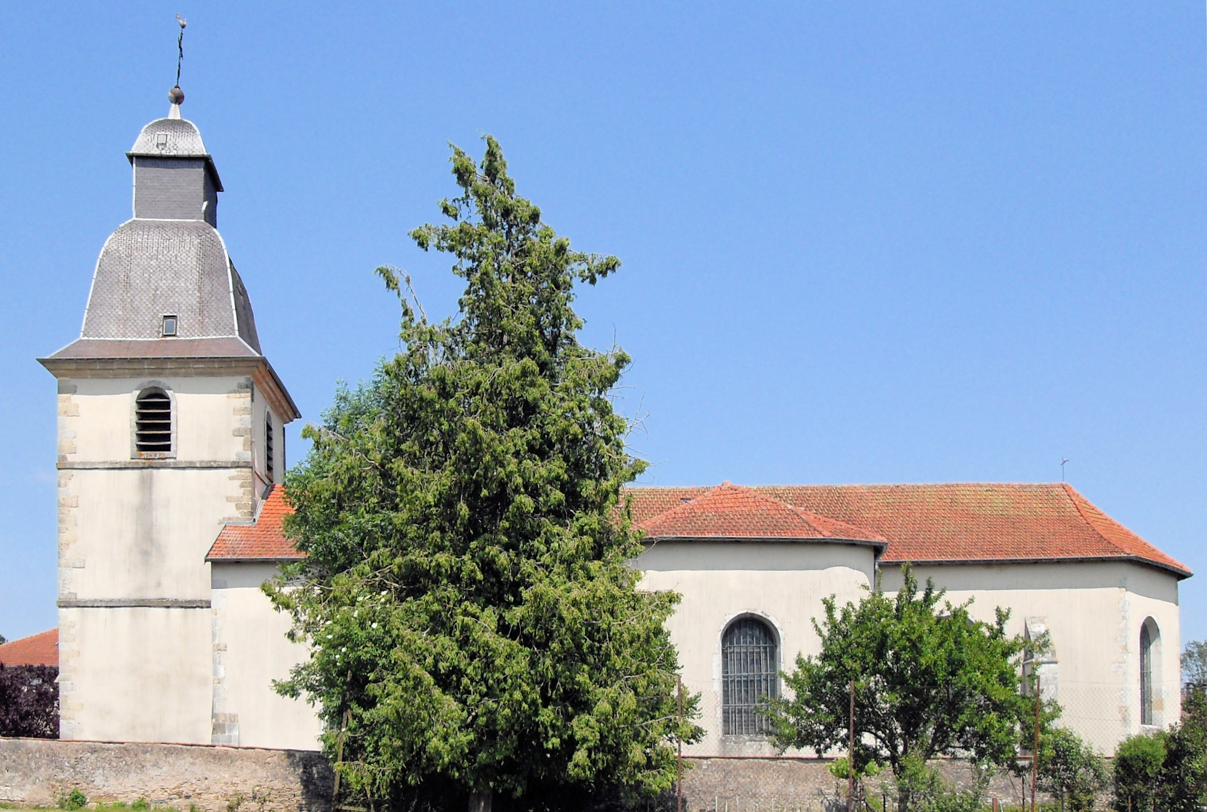 L'église Saint-Quentin d'Houécourt